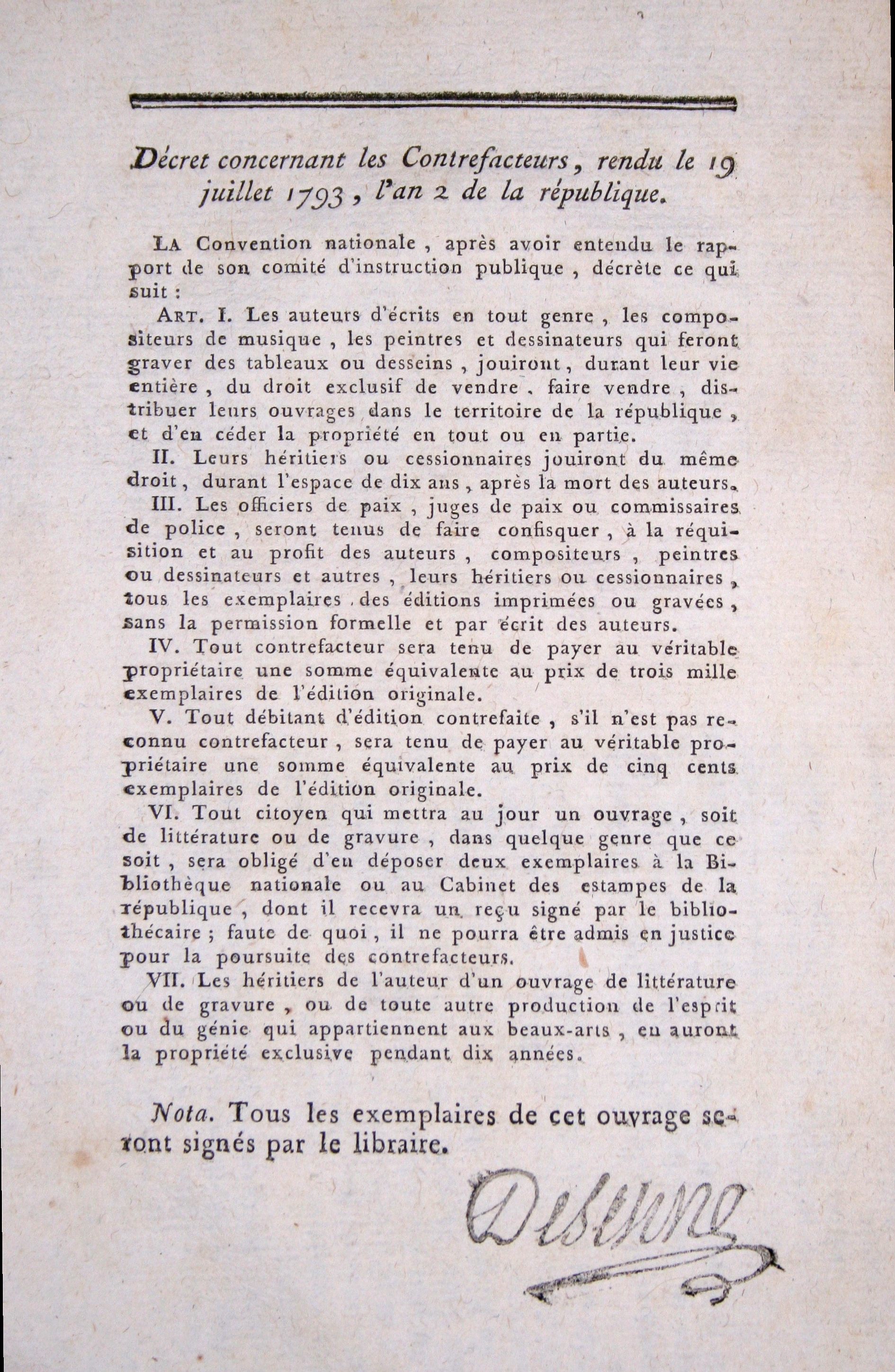 décret de la convention sur le droit d'auteur (page de garde d'un ouvrage de la bibliothèque patrimoniale de Gray (France)